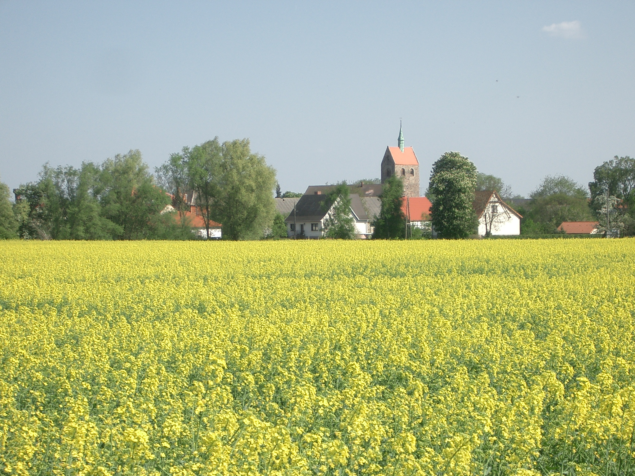 Blick auf Groß Schwechten